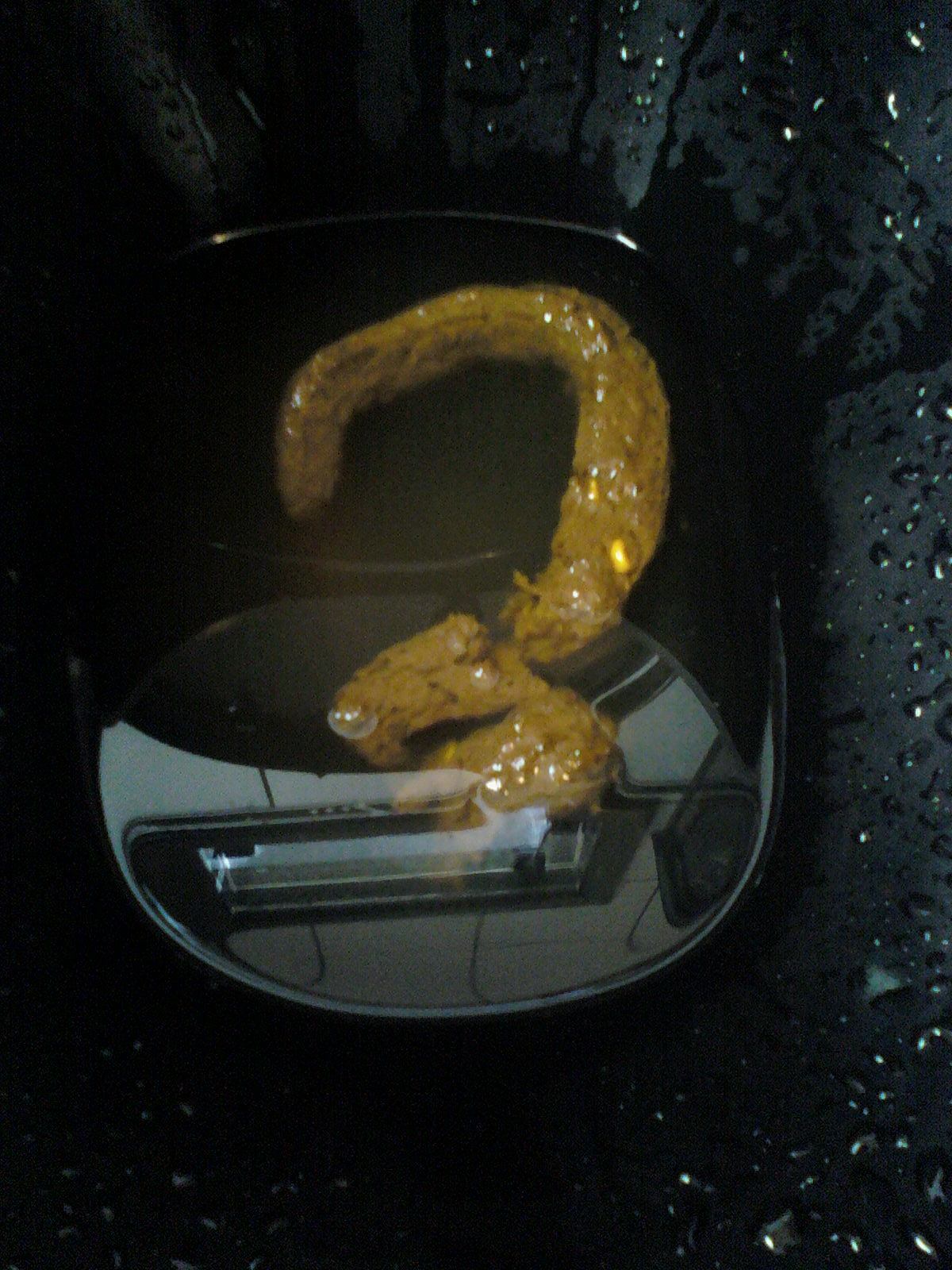 Fezes Humana